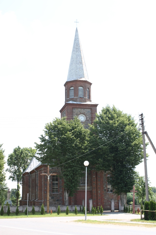 Gardamo Šv. Roko bažnyčia